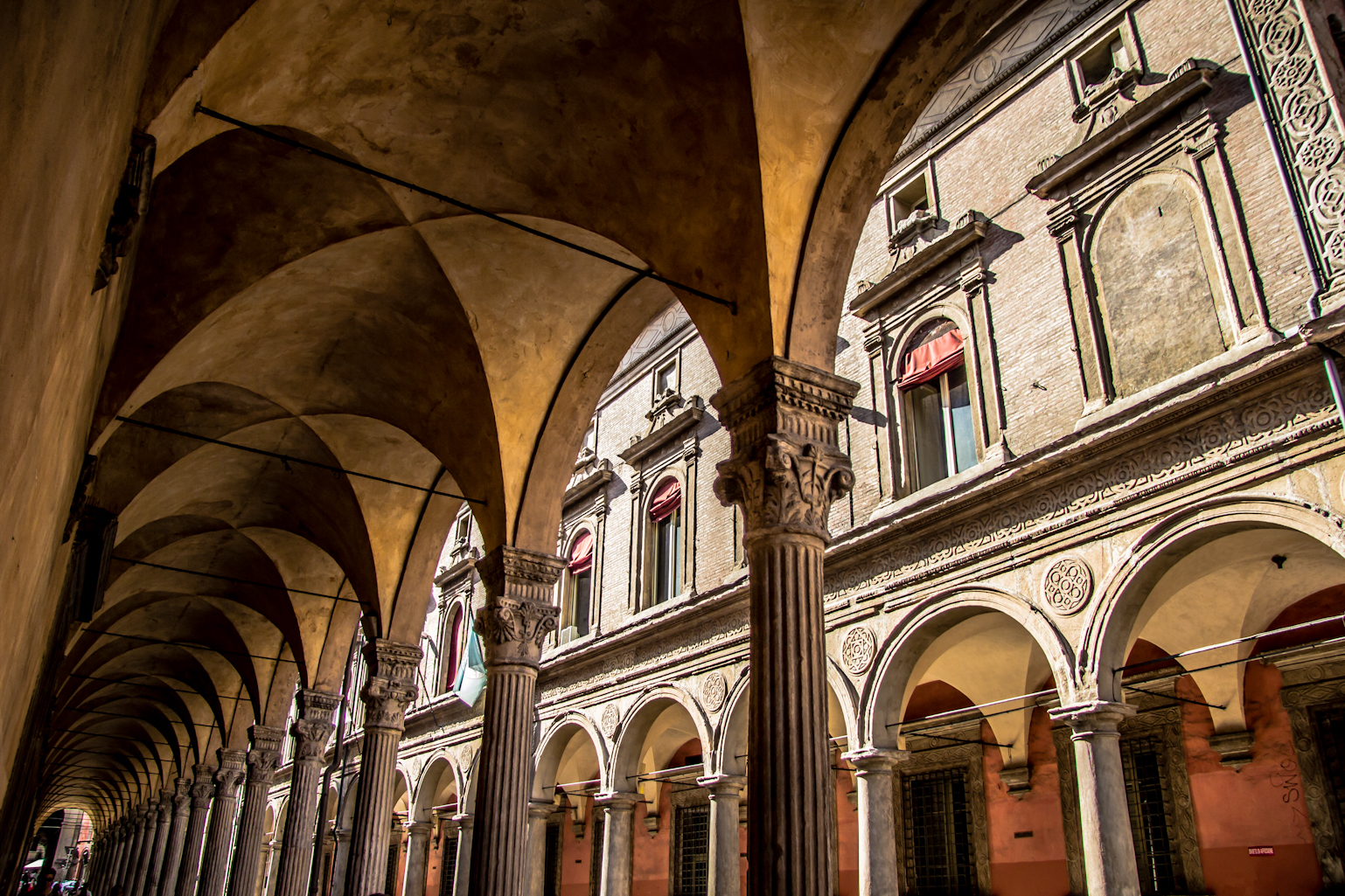 Portico di San Giacomo This is a photo of a monument which is part of cultural heritage of Italy.